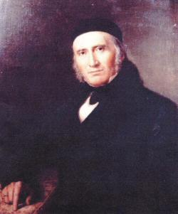 Johann Friedrich Ludwing Hausmann